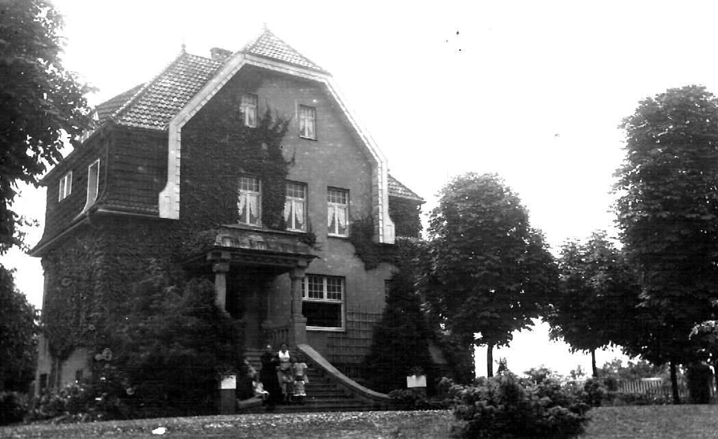 Fabrikantenvilla Bartmann & Sohn, Wegberg-Beeck mit Franziska Bartmann, Margarethe Herold + 4 Enkel